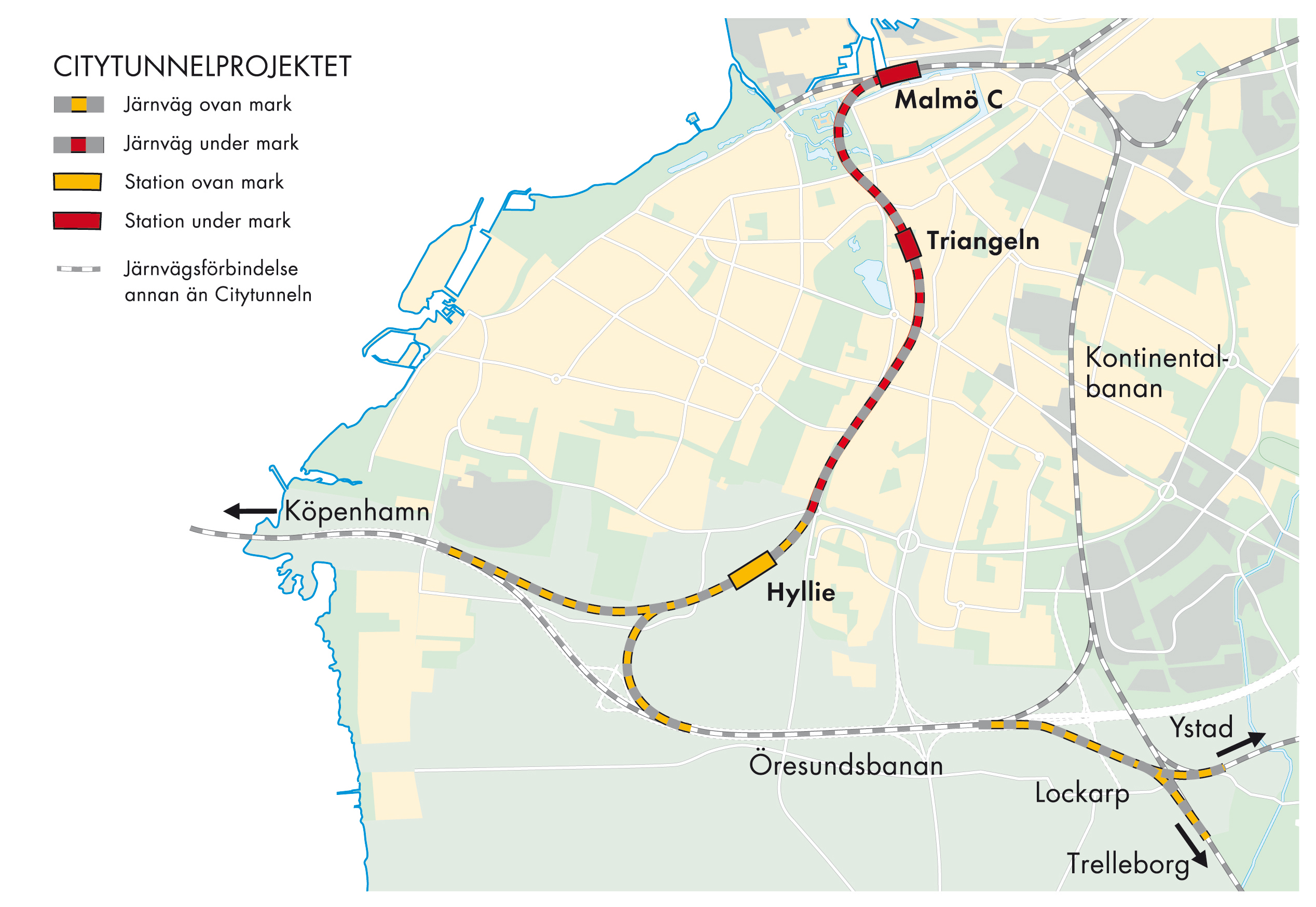 Karta med Citytunnelns hela sträckning med stationer, tunnlar och järnväg markerade.